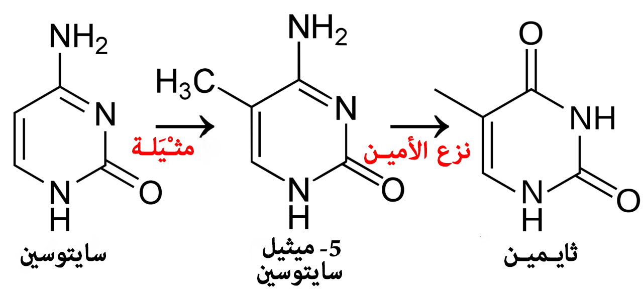 العملية الطبيعية للخلية في مثيلة السايتوسين ليصبح 5-ميثيل سايتوسينن ثم تتبعها عملية نزع الأمين التلقائية ليصبح ثايمين.